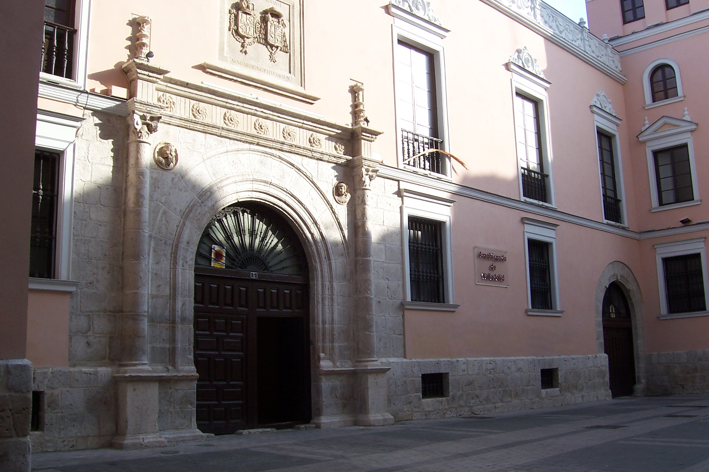 Palacio Arzobispal de Valladolid (España). Antiguas casas de la familia Villasante del siglo XVI.